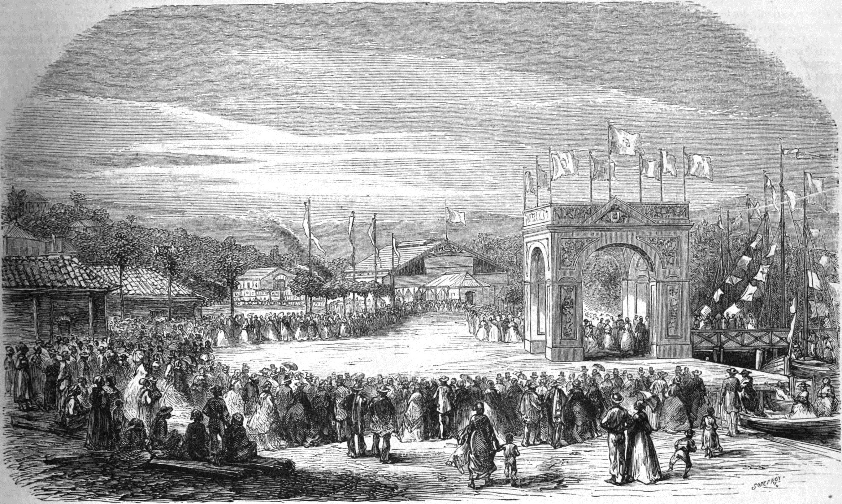 Inauguration du chemin de fer de Cantagallo, au Brésil. — D'après un dessin envoyé par M. le baron de Geslin.